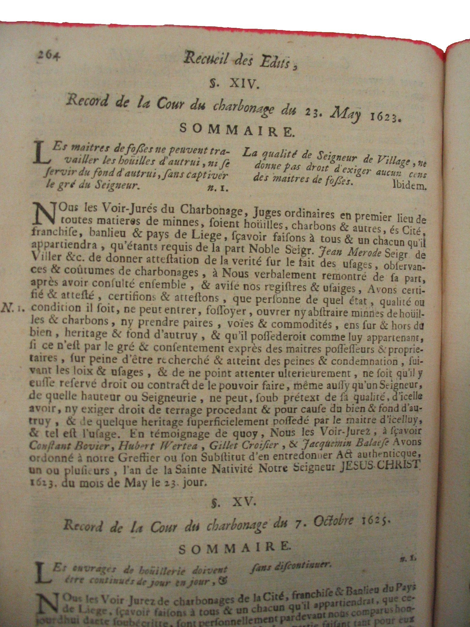 Record de la cour des Voir-Jurés de charbonnages (Louvrex, édits,... 1730)